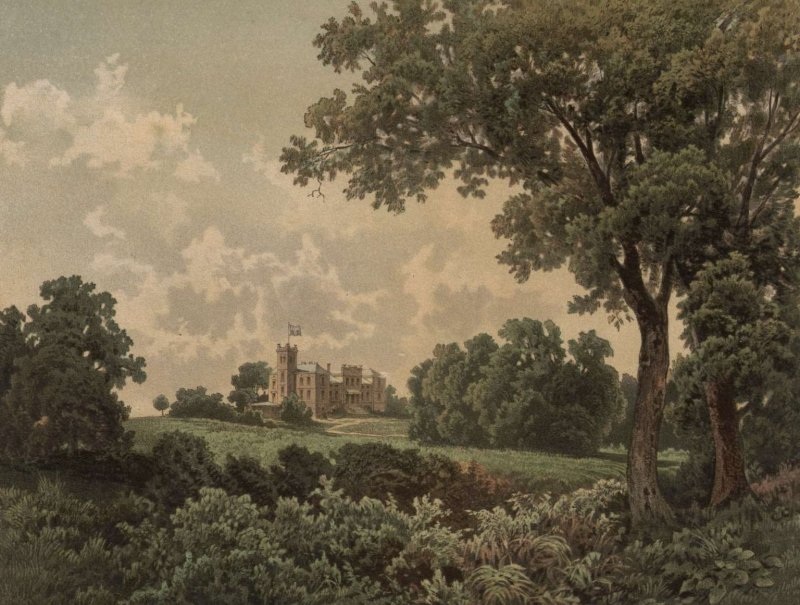 Schloß Vahnerow, Lithographie um 1860, Alexander Duncker (Hrsg.)